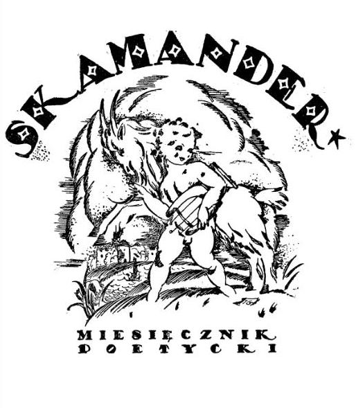 Skamander - polskie czasopismo literackie